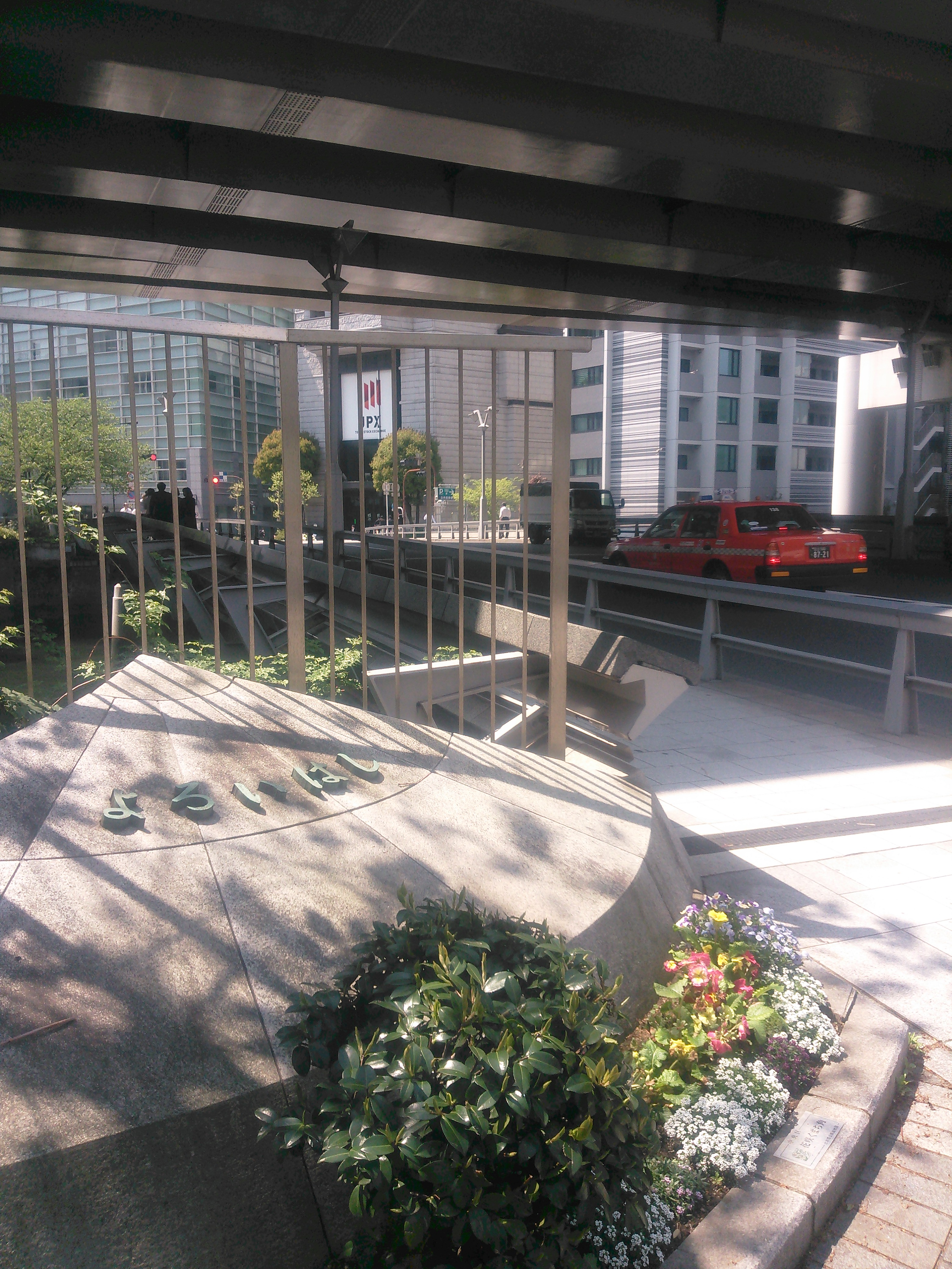 東京の日本橋川に架かる鎧橋